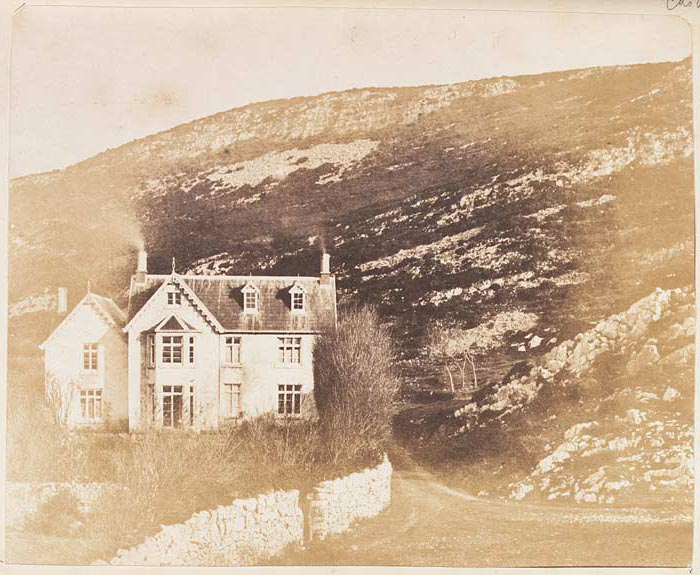 Ffotograffydd/Photographer: John Dillwyn Llewelyn Dyddiad/Date: 185- Cyfrwng/Medium: Print taken from a calotype negative Cyfeiriad/Reference: viv00046 (pb02376/26) Rhif cofnod / Record no.: 3590001 Rhagor o wybodaeth am Ffotograffiaeth Gynnar Abertawe yn Llyfrgell Genedlaethol Cymru More information about Early Swansea Photography at the National Library of Wales